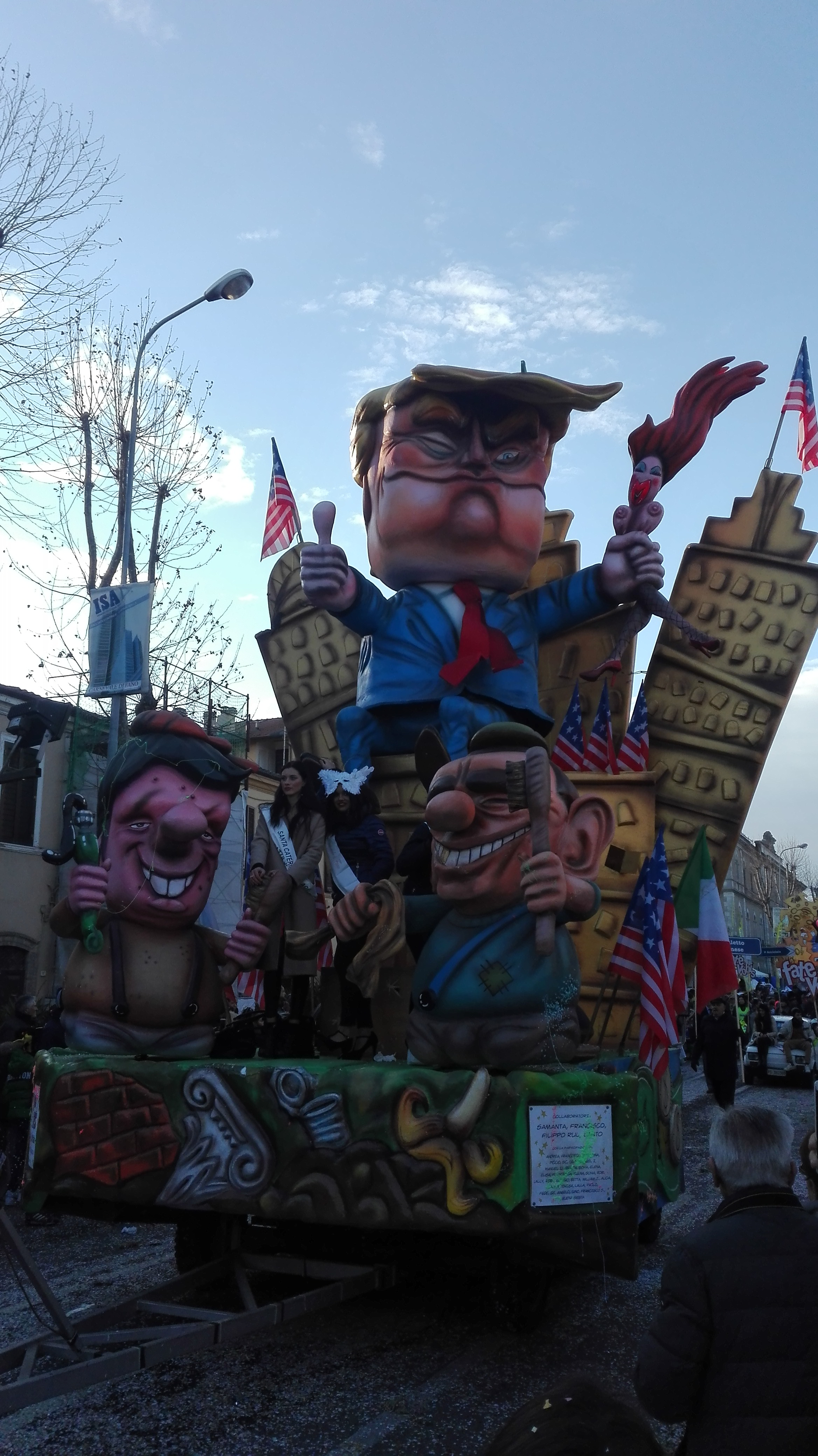 Il carro raffigurante le maschere di Donald Trump, Silvio Berlusconi e Matteo Renzi al Carnevale di Fano nel 2018